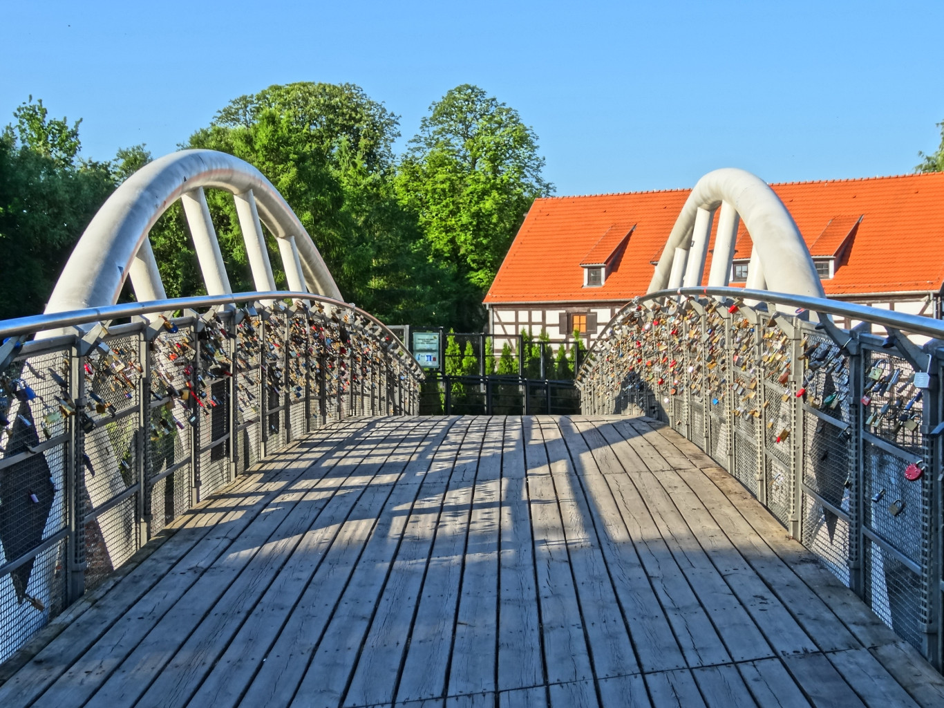 Kładka dla pieszych łącząca Wyspę Młyńską z Operą Nova i bulwarami nad Brdą